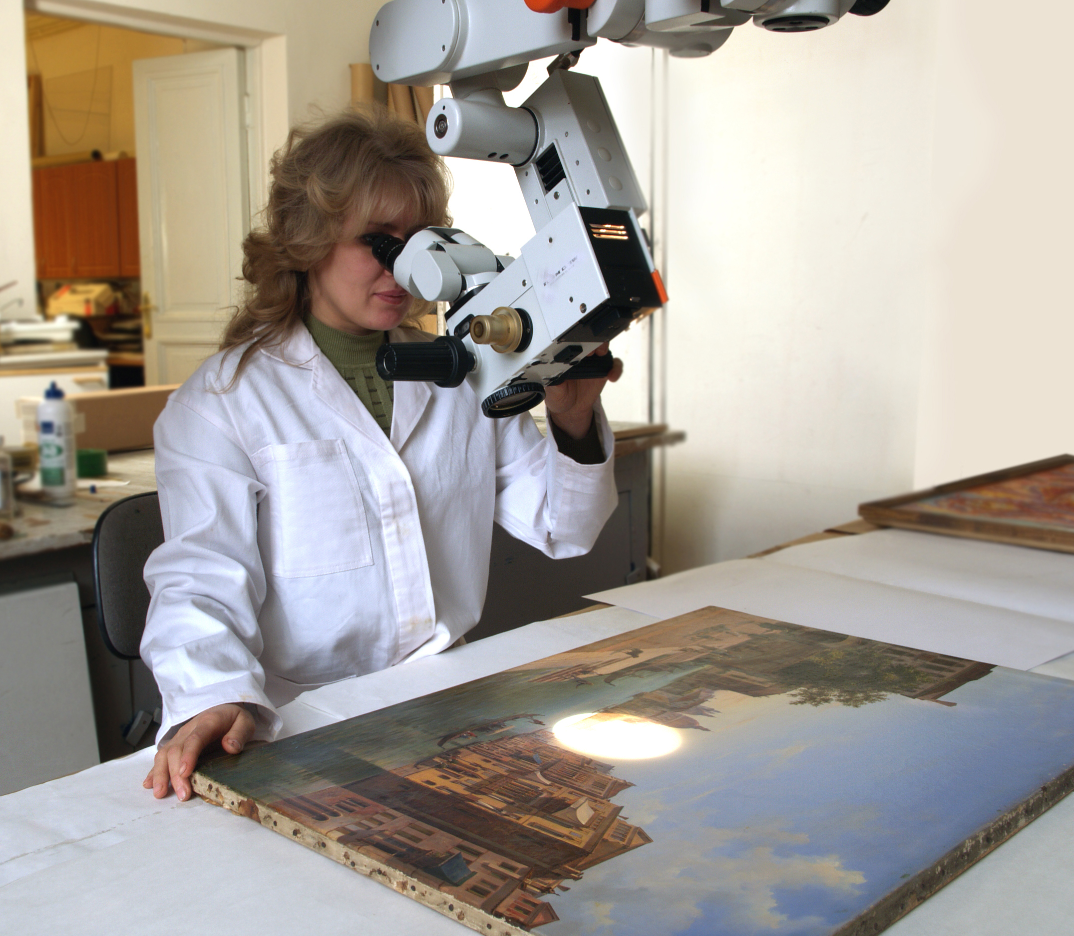 Отдел реставрации музейных ценностей. Русский музей. Фото 2010 года